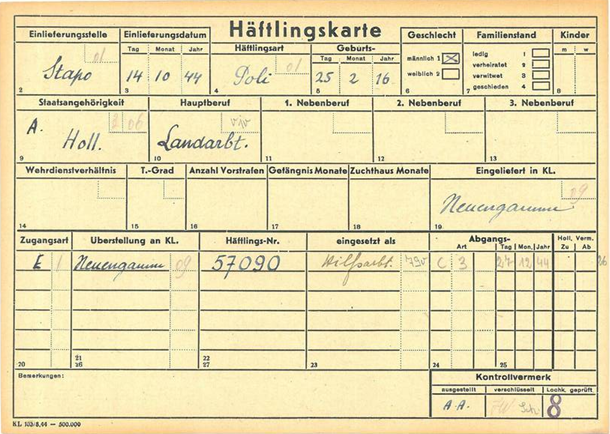 Gevangenenkaart Jan de Visser, Vrouwenpolder (omgekomen in Neuengamme)